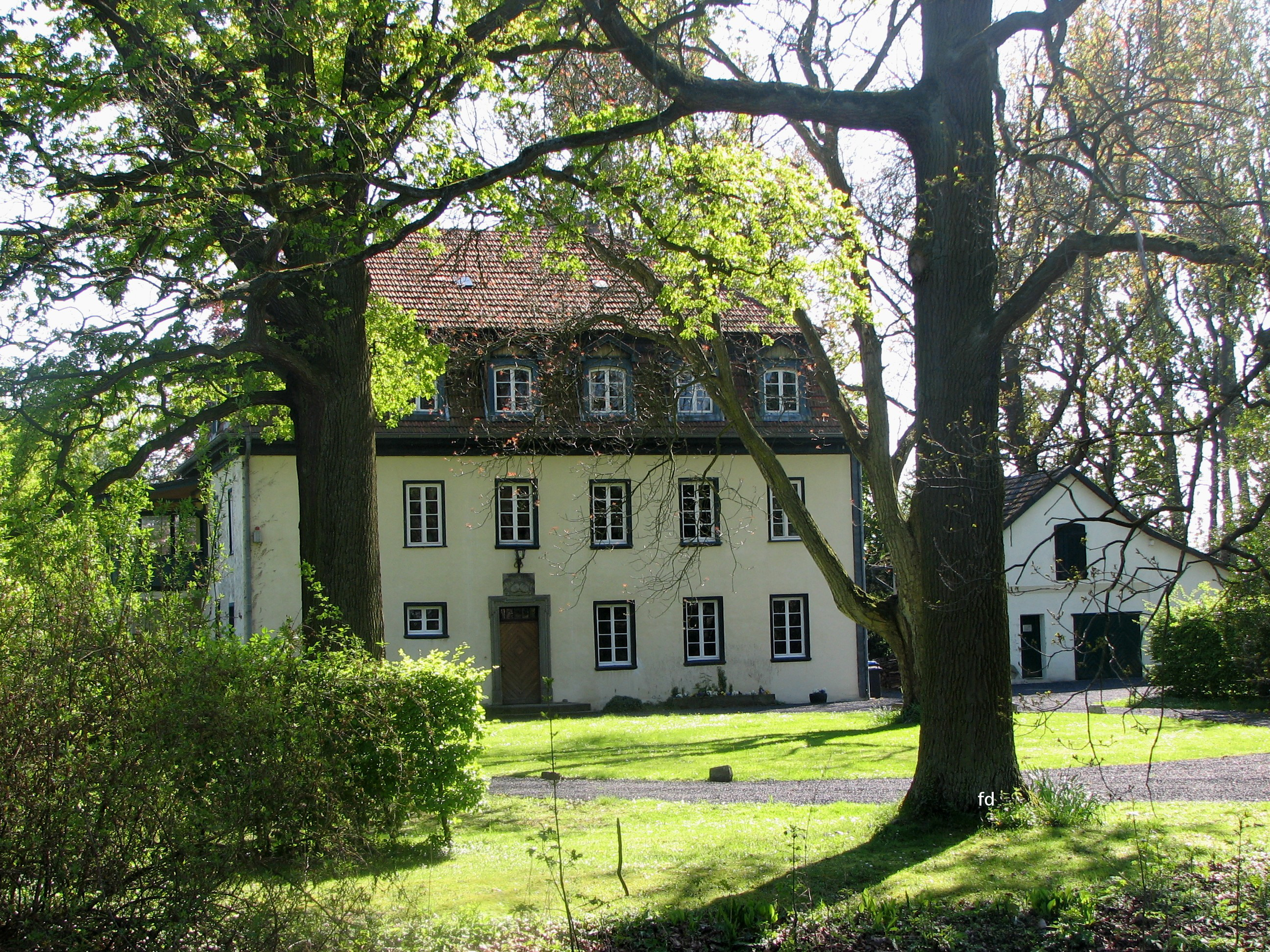 Haus Koeningen, Haupthaus, Werl. This is a photograph of an architectural monument.